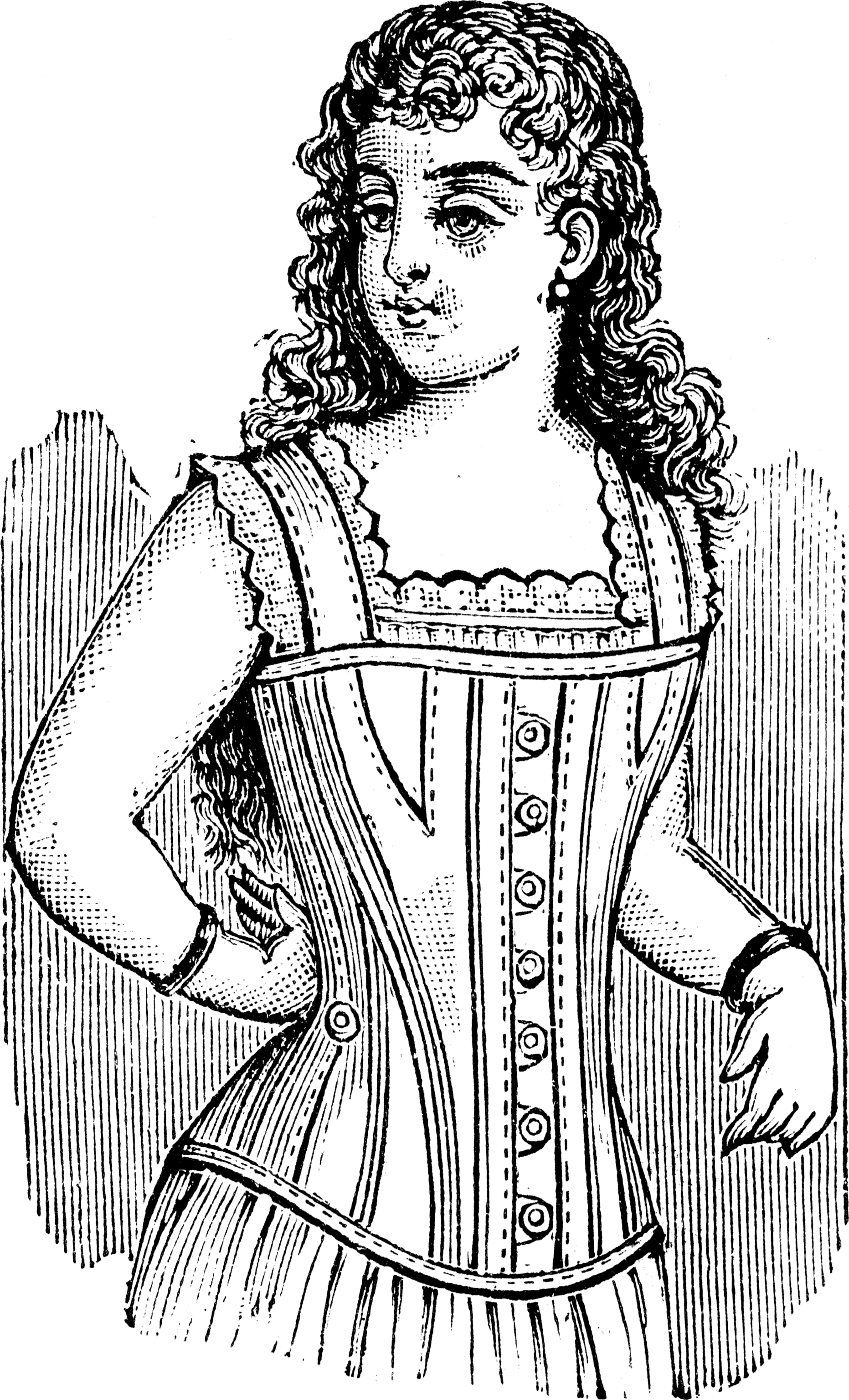 No. 853. CORSET en coutil mastic, à bretelles, à busc ou à boutons, de 8 à 13 ans. 2.95